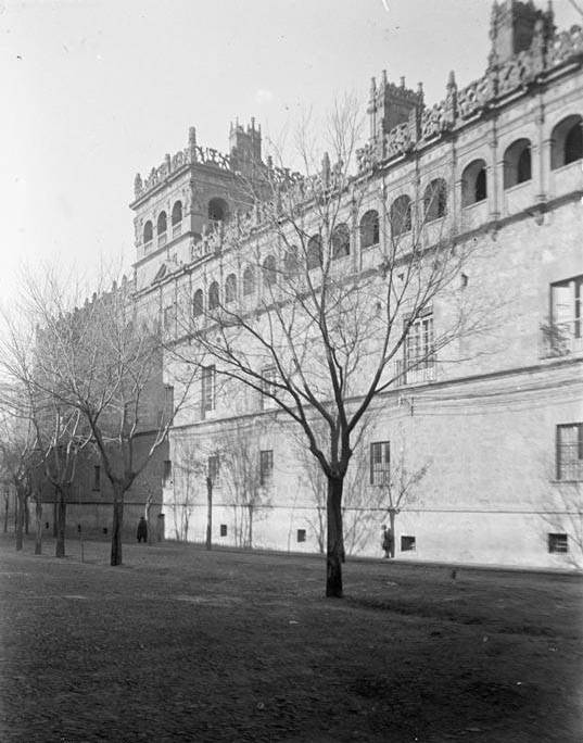 Imatge